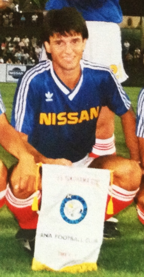 Wagner Lopes en Nissan Motors SC